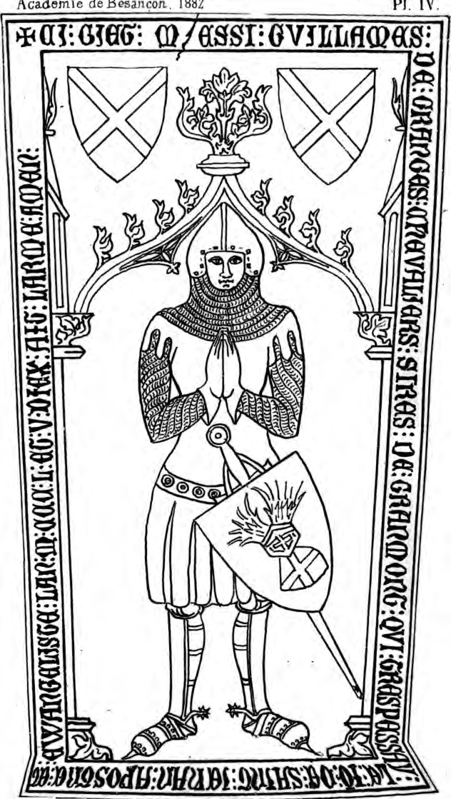 Reproduction de la tombe de Guillaume II de Granges, seigneur de Grammont, mort le 27 décembre 1355, issue de : Jules Gauthier (séance du 25 janvier 1882), « Les inscriptions des abbayes cisterciennes du diocèse de Besançon », dans Procès-verbaux et mémoires de l'Académie des sciences , belles-lettres et arts de Besançon, Besançon, P. Jacquin, 1883.